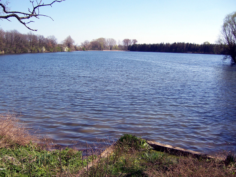 Praha, Uhříněves, Podleský rybník / Prague, Uhříněves, Podleský Pound